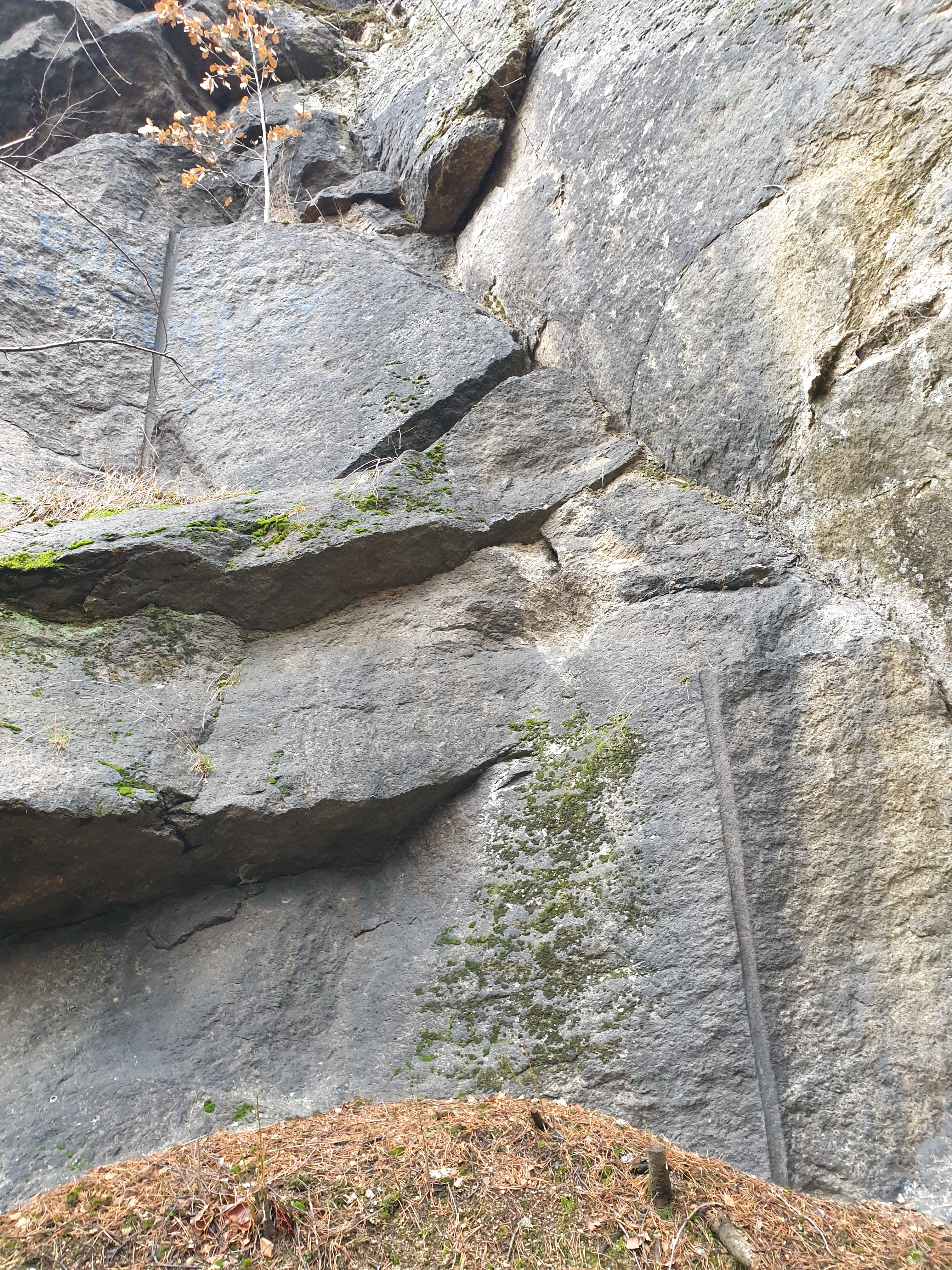 Odwierty górnicze widoczne w ścianie skalnej Morskiego Oka w Cieplicach Śląskich-Zdroju.